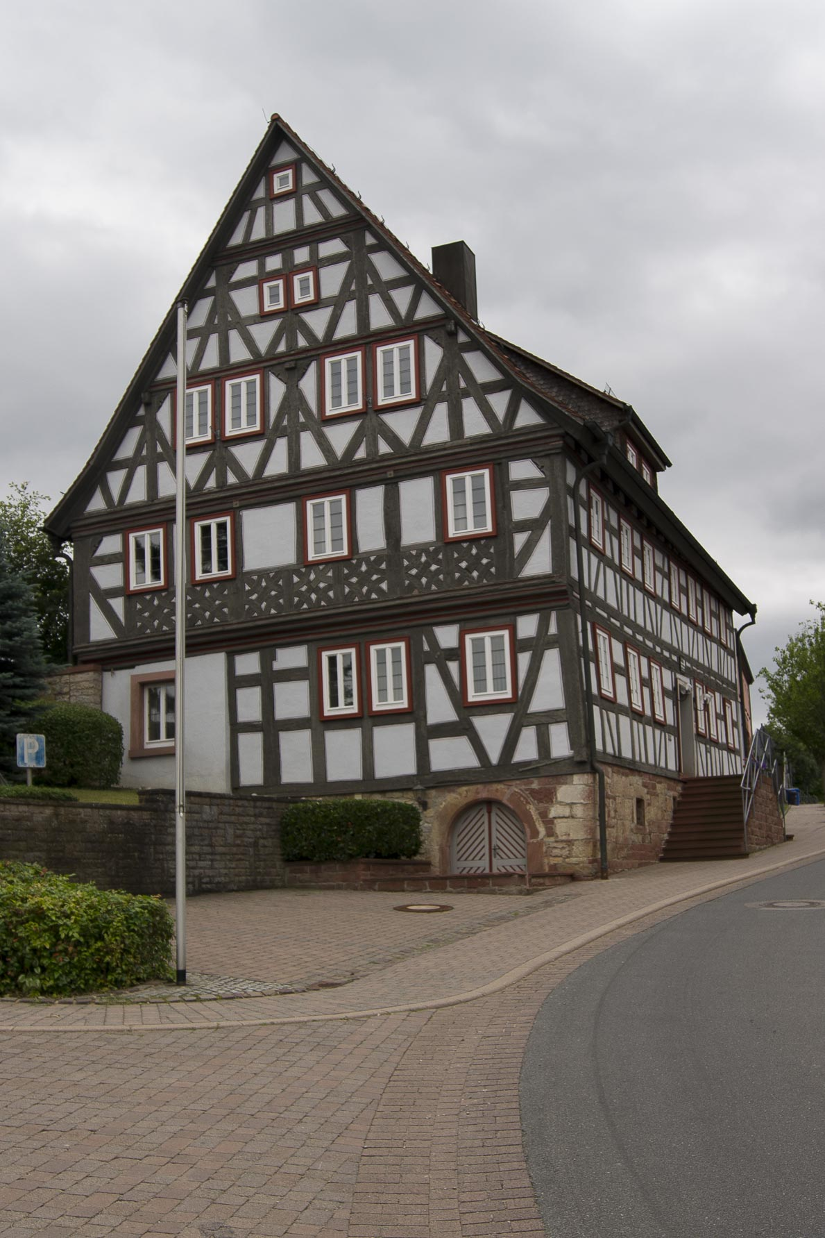 Die Straßenseite des Götzinger Rathauses